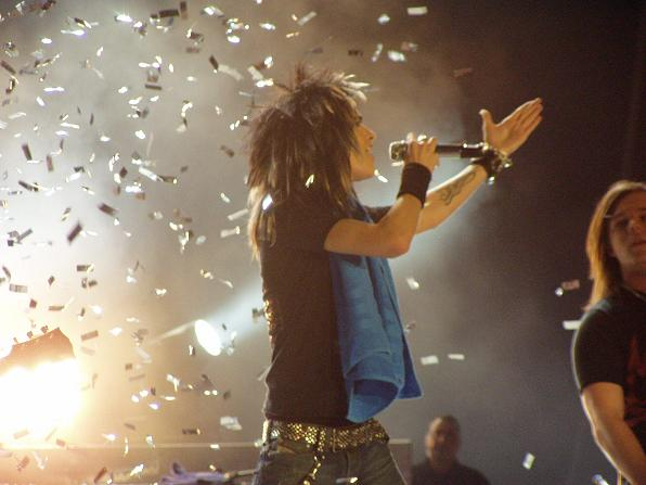 фото Билла Каулица с концерта в Москве от 27.09.2007 в СК "Олимпийский"